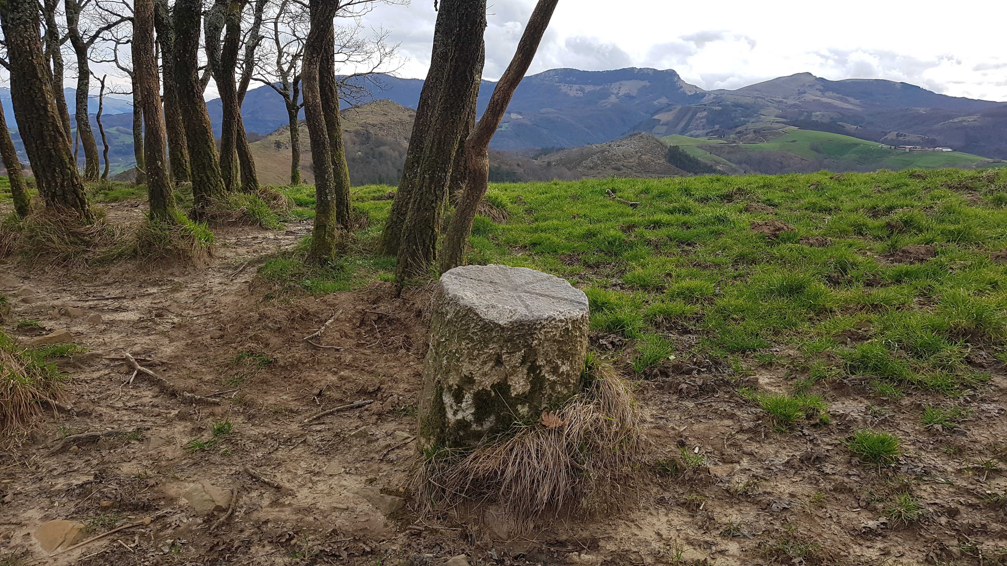 Zizurkilgo Selako gaineko saroiko artamugarria. Atzean Zarateaitz, Hernio eta Gazume mendiak.